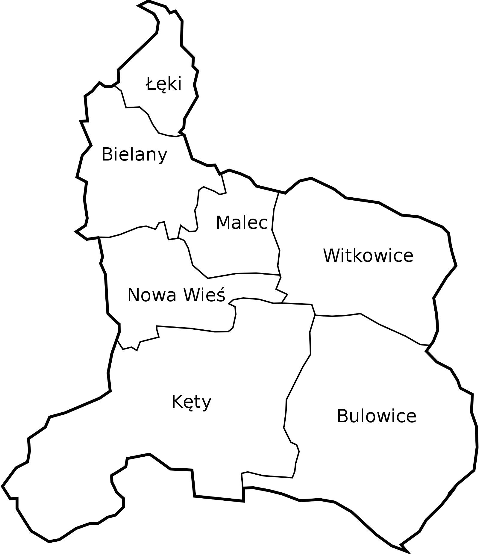 Gmina Kęty: miasto i sołectwa